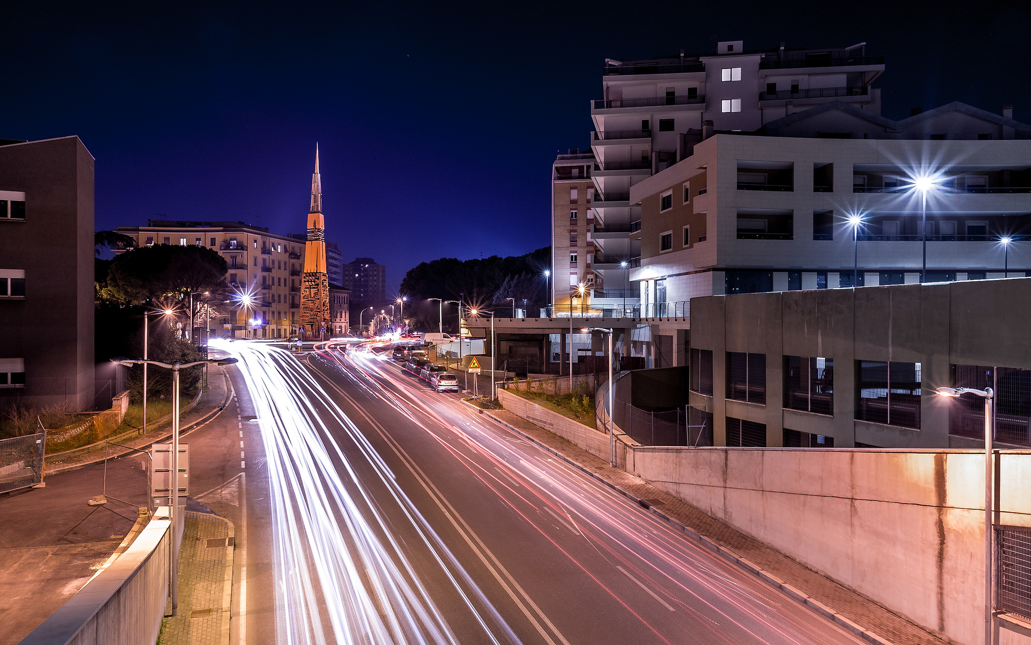 Monumento contemporaneo ternano detto: la Lancia di Luce. Questo obelisco è alto 32 metri, si compone di 4 elementi, costituiti da 27 componenti fusi e altri 453 vari, del peso complessivo di quasi 90 mila chili. Per la sua realizzazione sono state necessarie 6.000 ore per la costruzione dei modelli, 4.000 per quella delle parti fuse – 105.000 chili di acciaio liquido per i pezzi fusi, con 21 colate al forno elettrico – 3.000 per l’assemblaggio. La lancia di luce è un gigante di 105 tonnellate di acciaio, divisa in quattro sezioni: la prima, la base, è in acciaio, cromo e rame ed è la più alta della quattro; la seconda, intermedia, è di acciaio inossidabile, l’acciaio speciale ternano; la terza sezione è dello stesso materiale ma più geometrica e affilata dell’altra; la quarta, infine, in ottone lucente, è appuntita e di notte si trasforma in un ago incandescente. Dal 28 novembre 1995, al termine di dieci anni di lavoro, la ‘lancia di luce’ è diventato uno dei simboli della città.